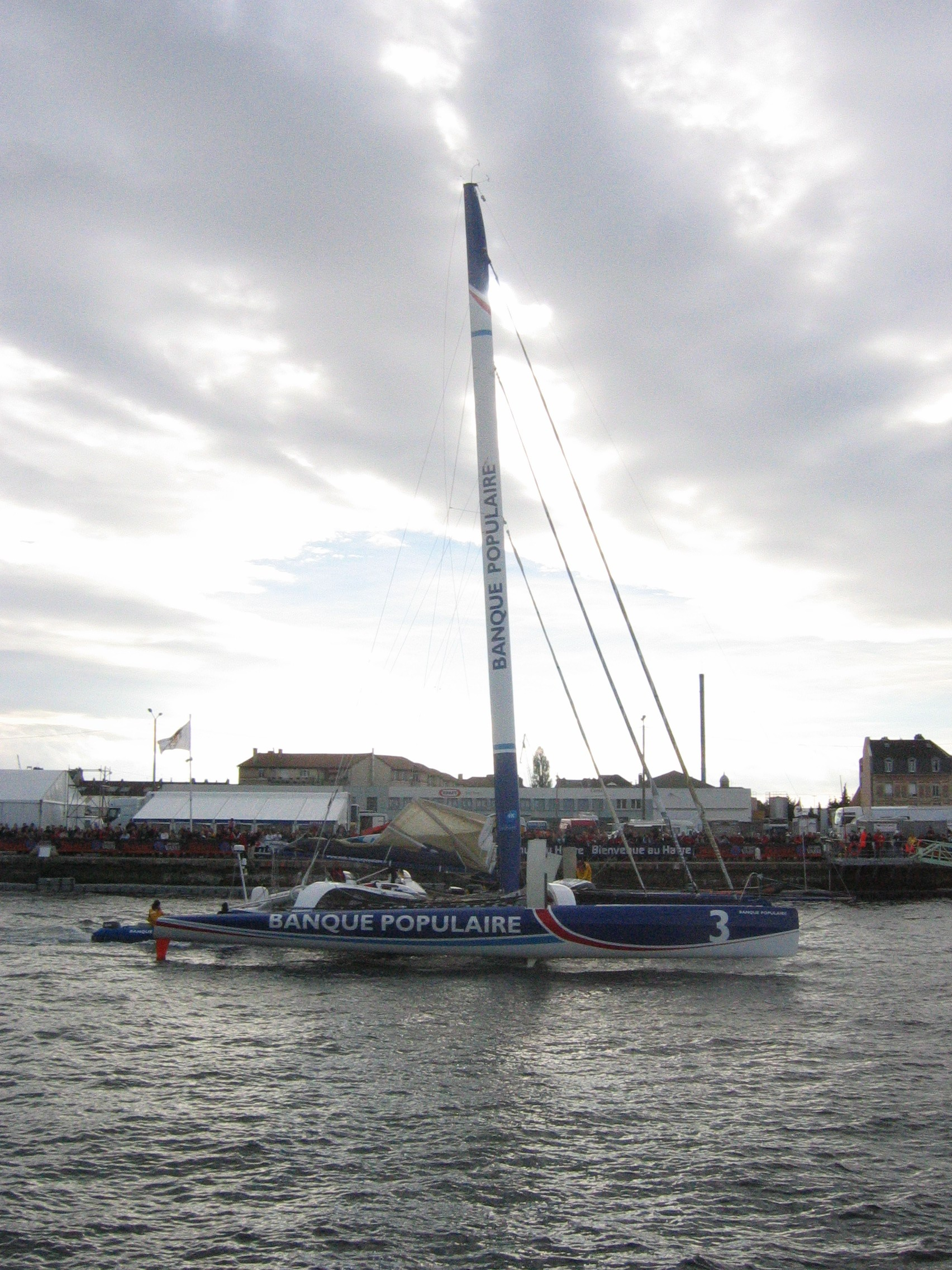 transat Jacques Vabre Le Havre-Salvador de Bahia 2005 Multicoque Banque Populaire Equipage : Pascal Bidégorry & Lionel Lemonchois (France) Date : le jour du départ, dimanche 6 novembre 2005, Le Havre, bassin Paul Vatine Photographie prise par l'utilisateur Urban